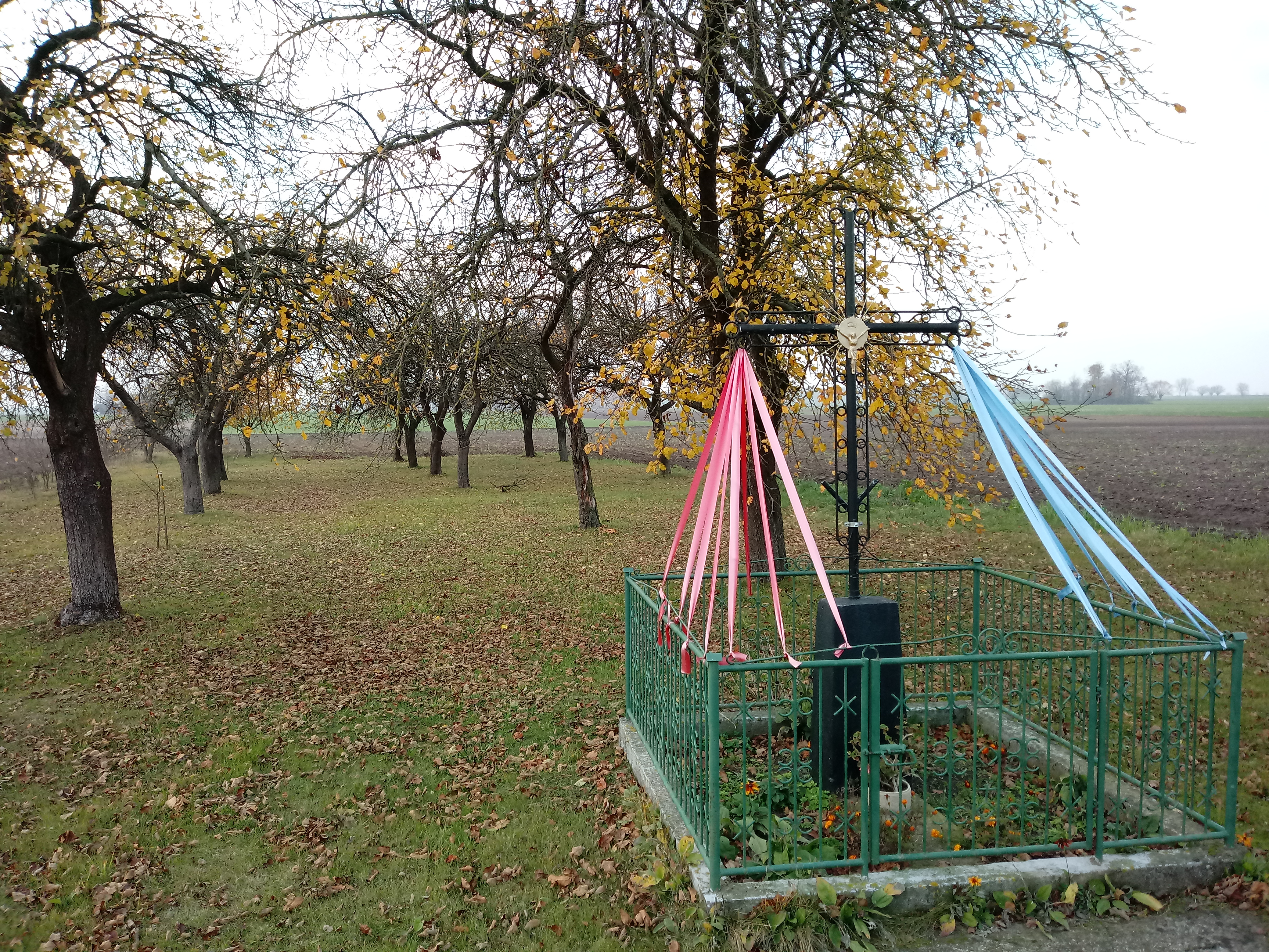 krzyż przydrożny w tle sad. wieś w Polsce położona w województwie podlaskim, w powiecie wysokomazowieckim, w gminie Szepietowo.